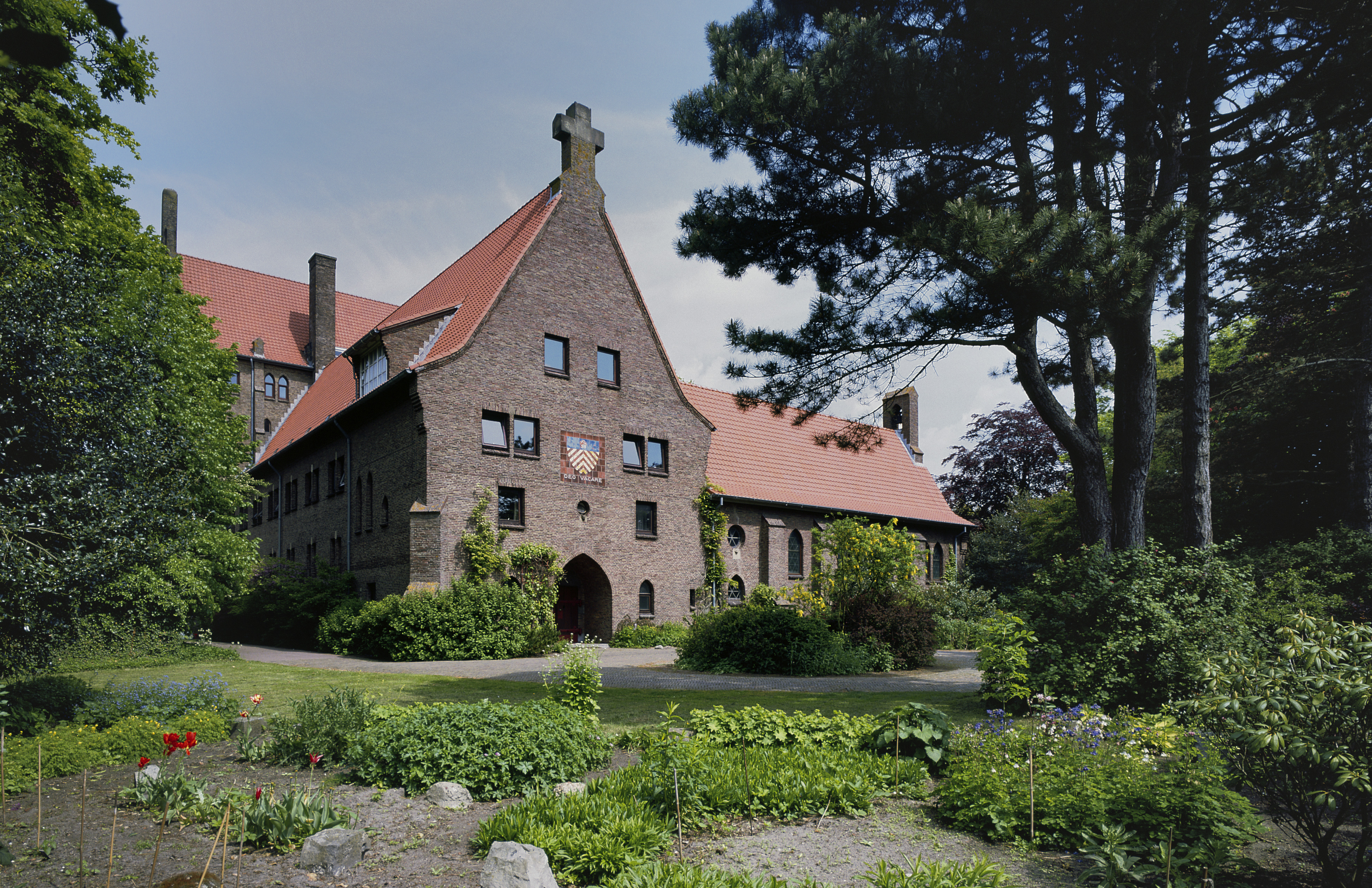 ABDIJ VAN ST.-ADELBERT: Overzicht (opmerking: Gefotografeerd voor ANWB Monumentenboek)